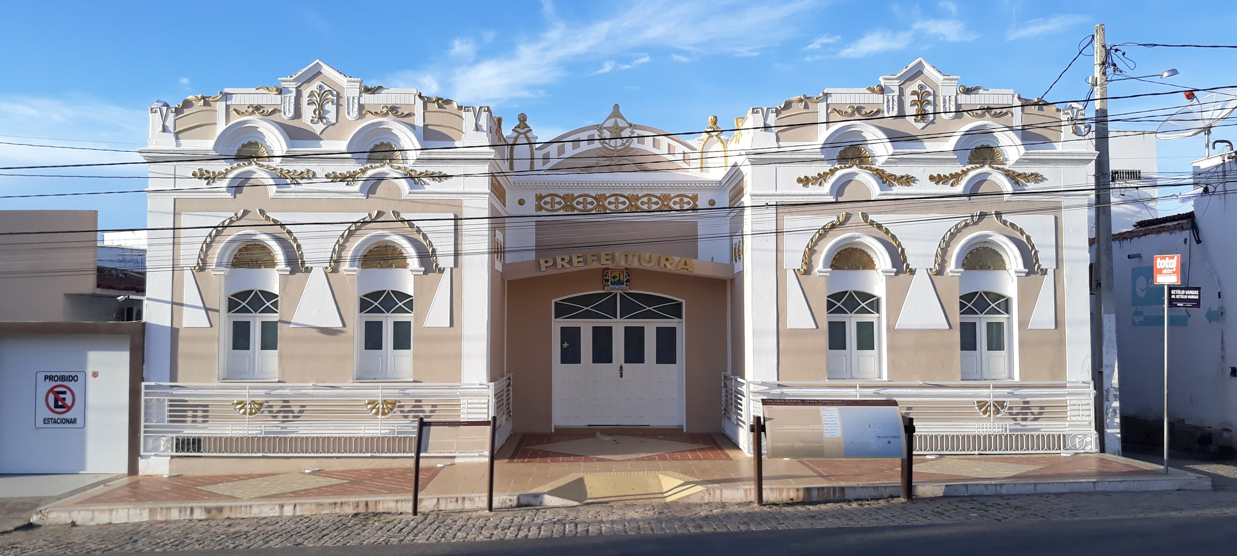 Palácio Municipal Prefeito José Fernandes de Melo, onde funciona a prefeitura de Pau dos Ferros, Rio Grande do Norte (Brasil), sede do poder executivo municipal.